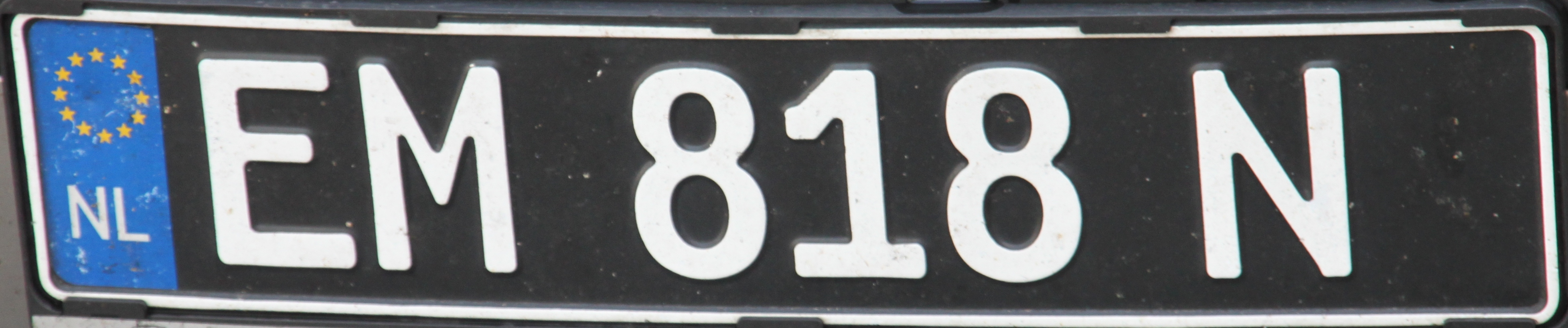 Voertuigen van werknemers bij de VN en/of grensverkeer (wonen in het buitenland, werken in Nederland, of juist omgekeerd) een combinatie van zes tekens van letters en cijfers door elkaar. Zwarte(!) plaat met witte letters en cijfers